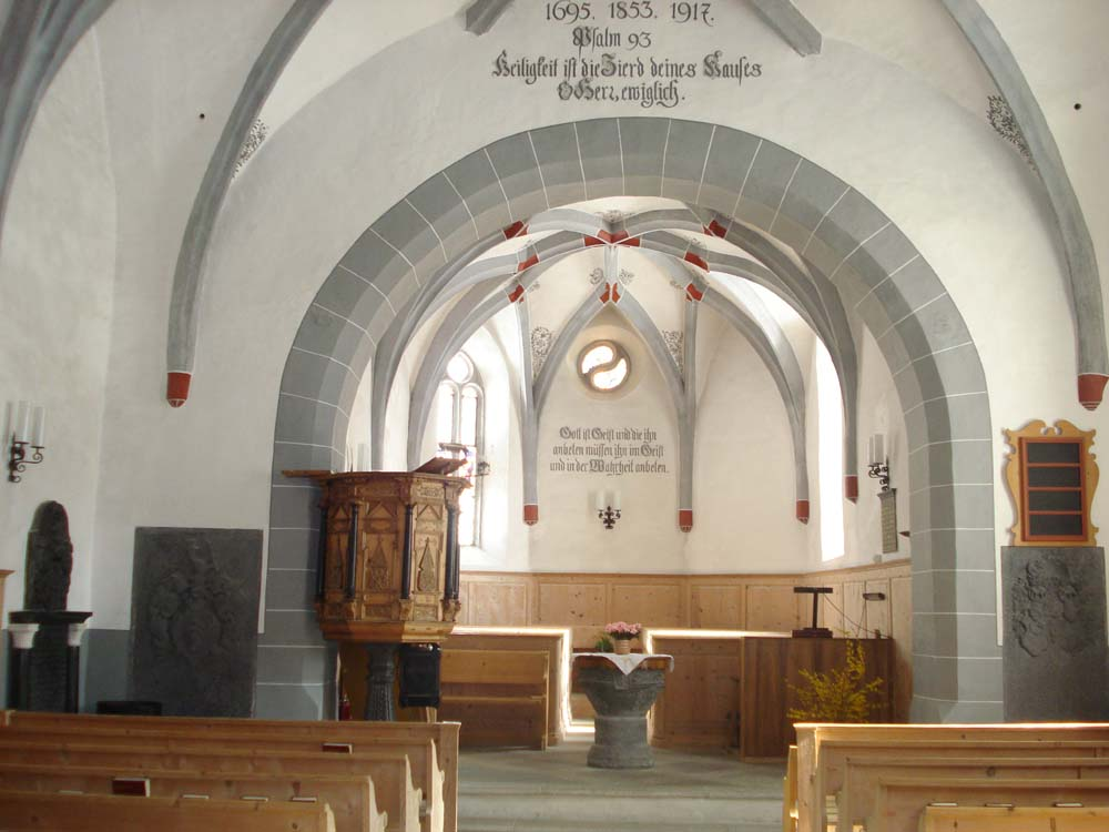 Vorderer Teil des Kirchenschiffs und Chor der reformierten Kirche Parpan